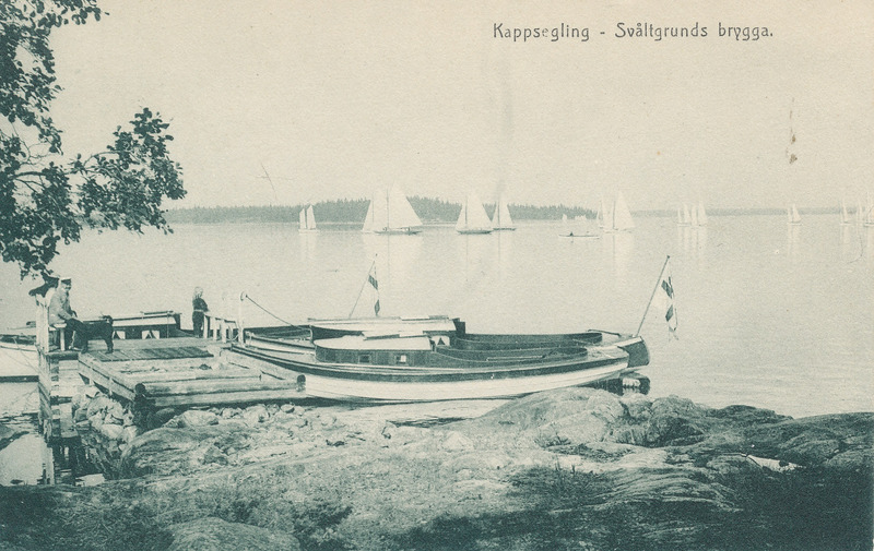 Vykort: Kappsegling Svältgrunds brygga. Union Postale Universelle Carte Postale Grand-Duché Finland. Serie A. No. 16.